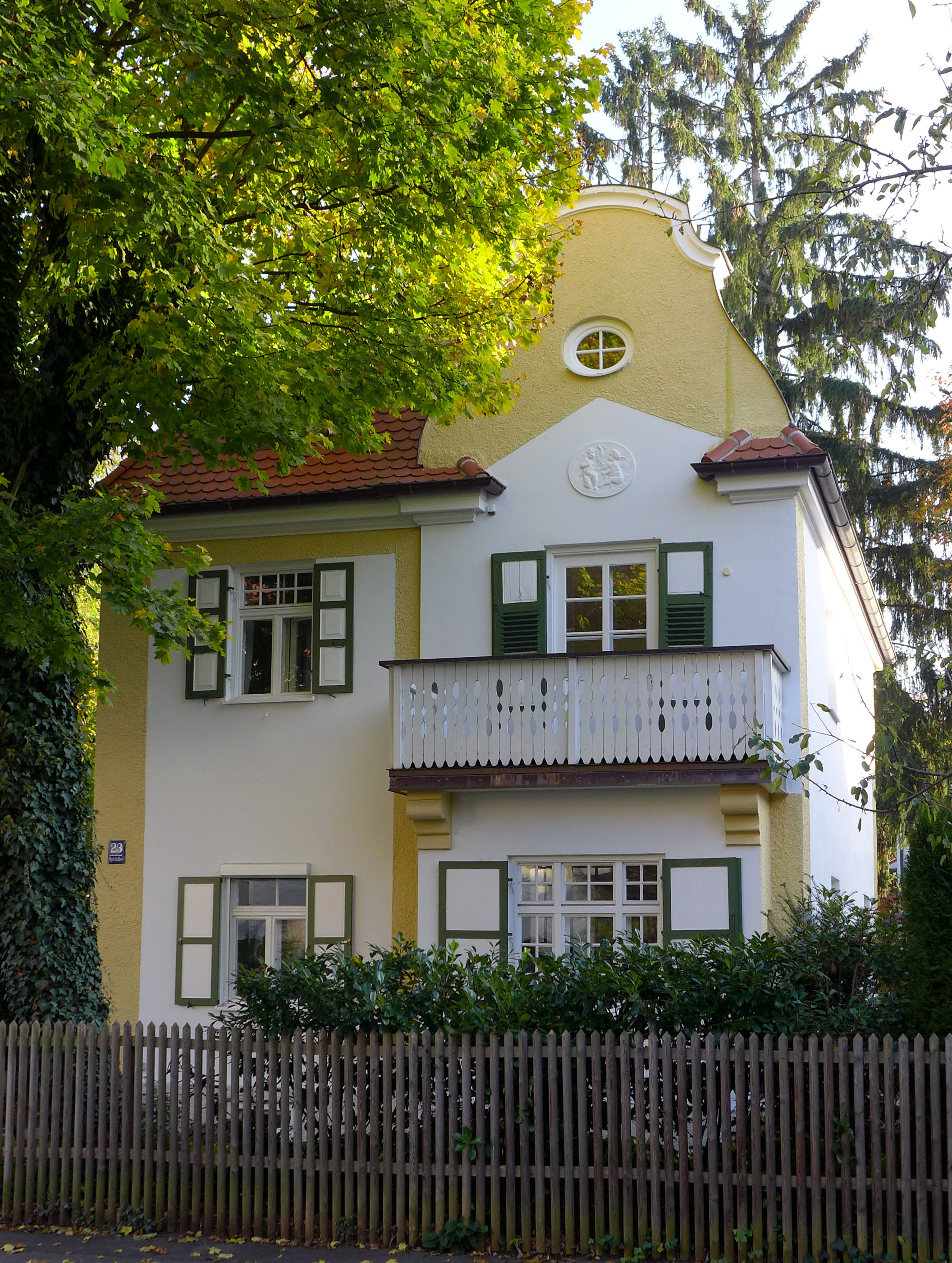 Apfelallee 23, München